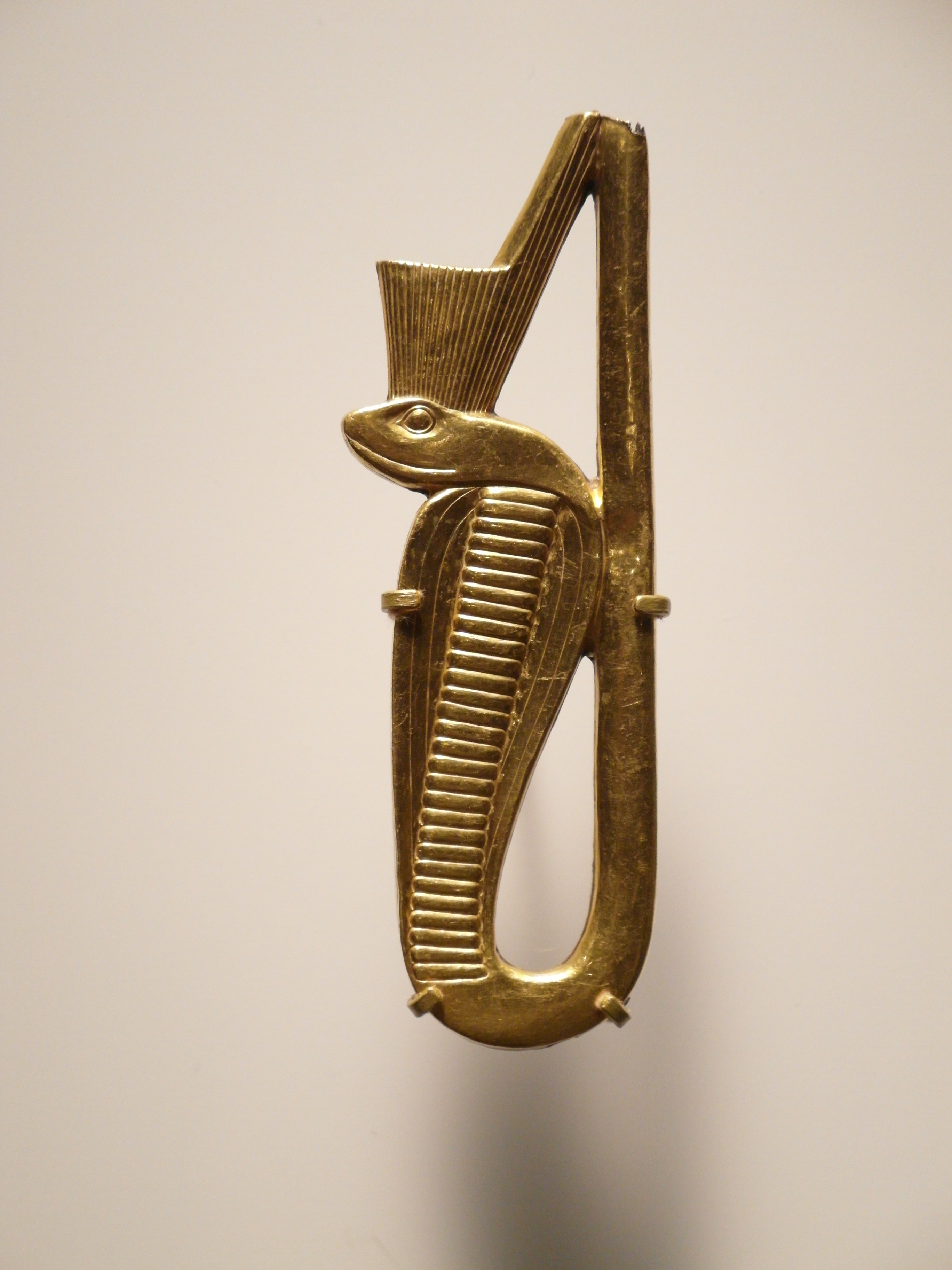 Pieza de mueble con forma de ureo, de oro. La cobra porta la corona roja del Bajo Egipto. Baja Época (hacia 664-332 a. C.). EA 16518.